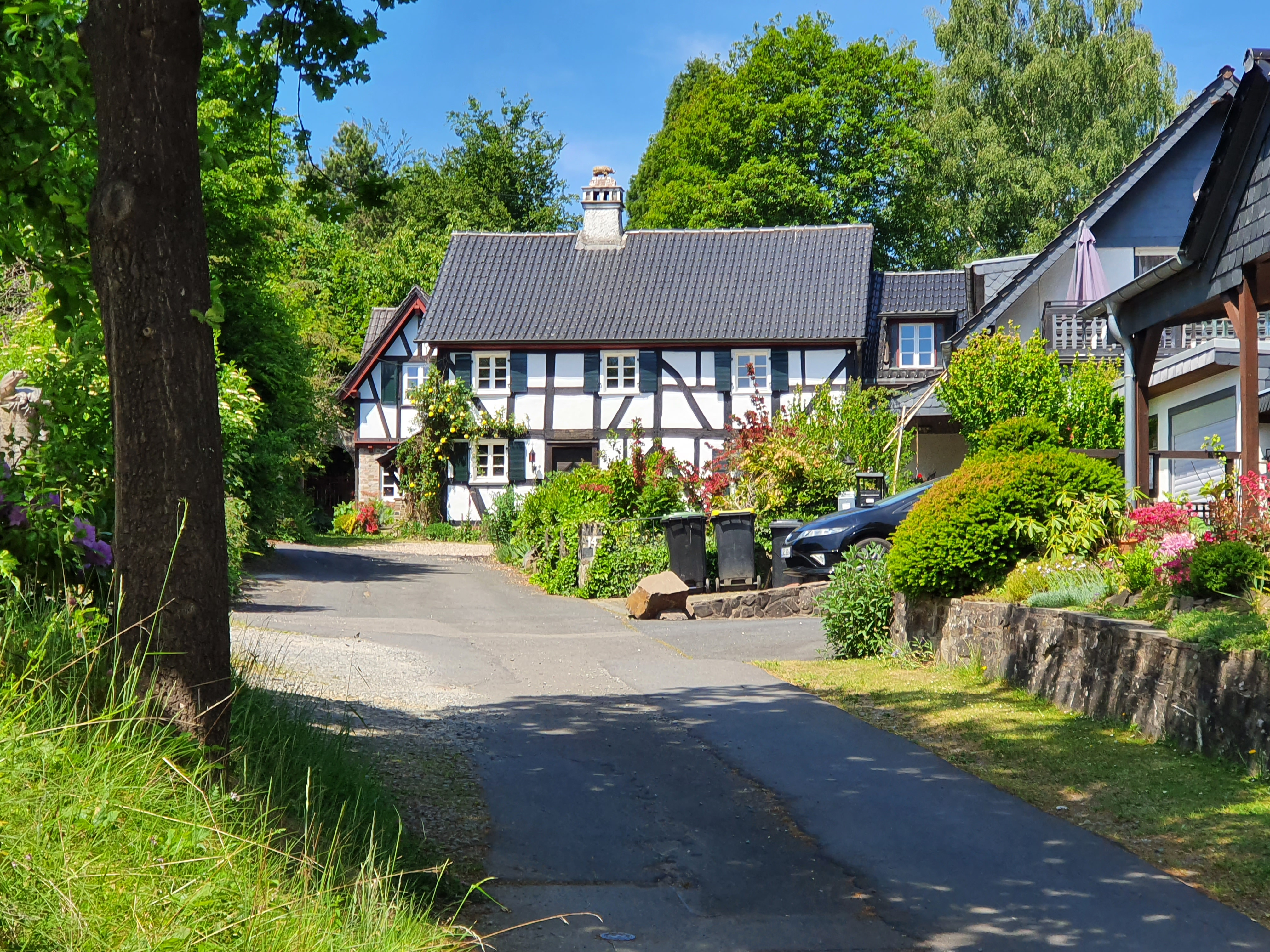 Ursprungskern von Huppach, einem Teilort der Gemeinde Ruppichteroth im Rhein-Sieg-Kreis in Nordrhein-Westfalen. Das Fachwerkhaus Huppach 16 steht unter Denkmalschutz.